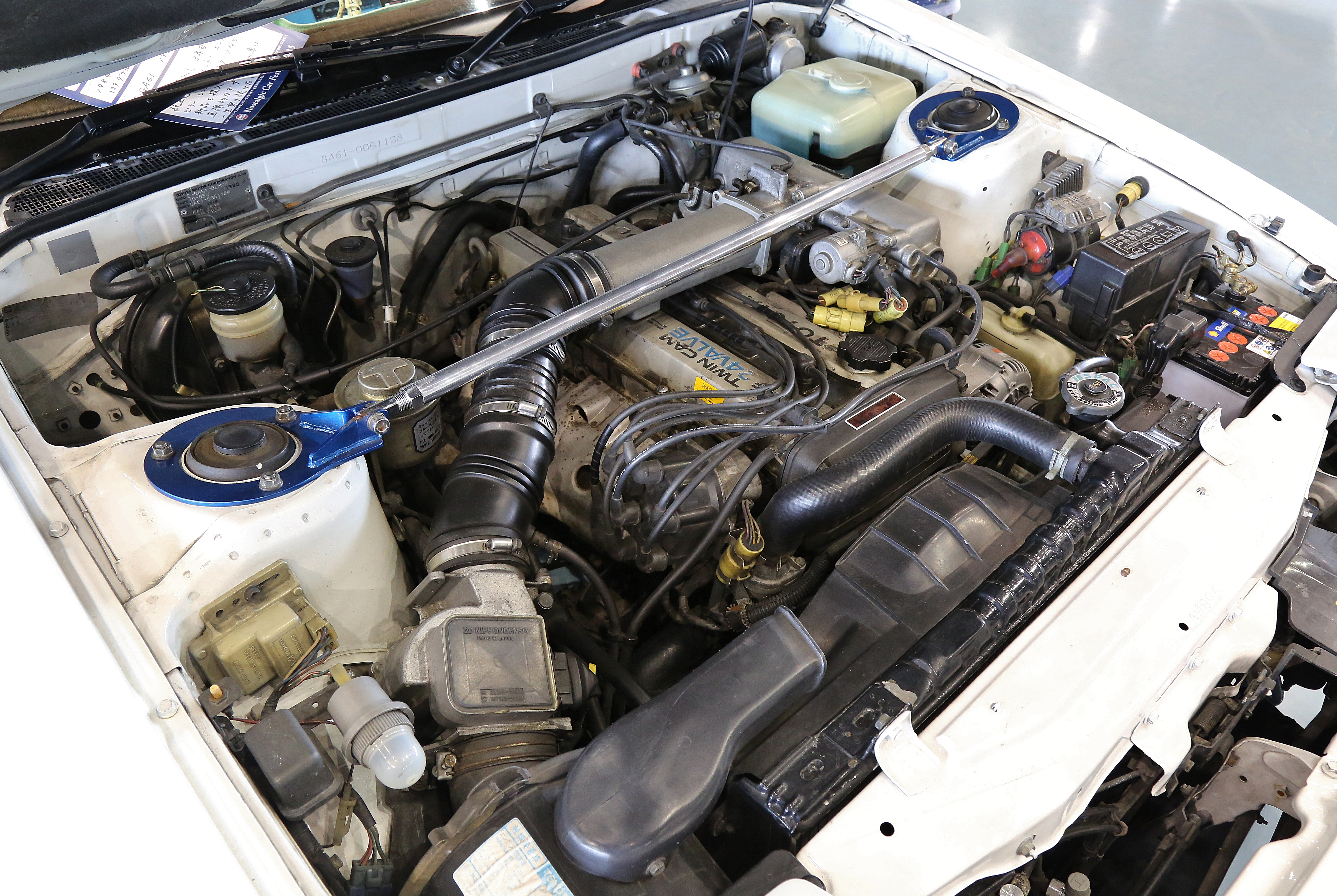 Toyota GA61